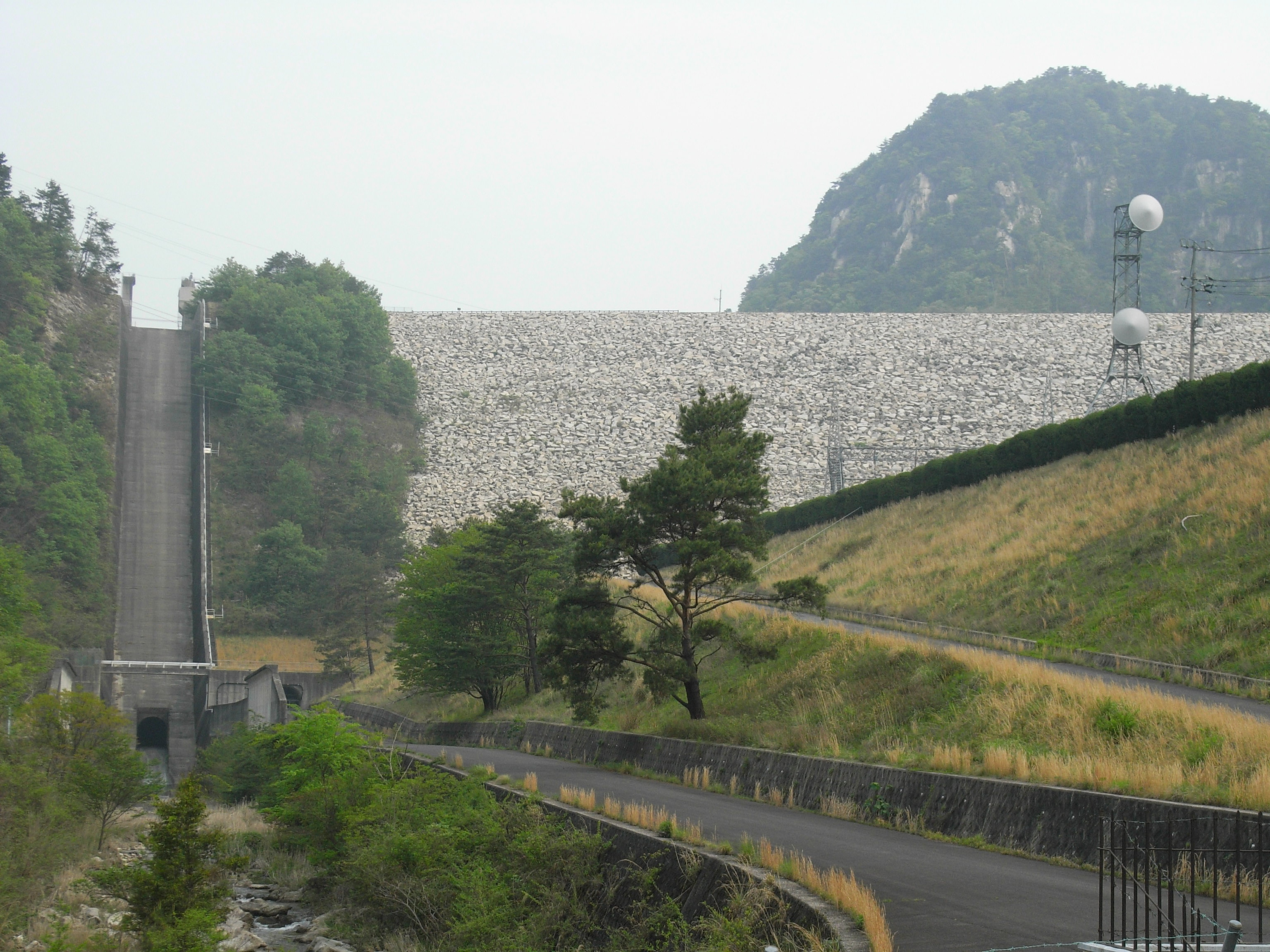 Dam